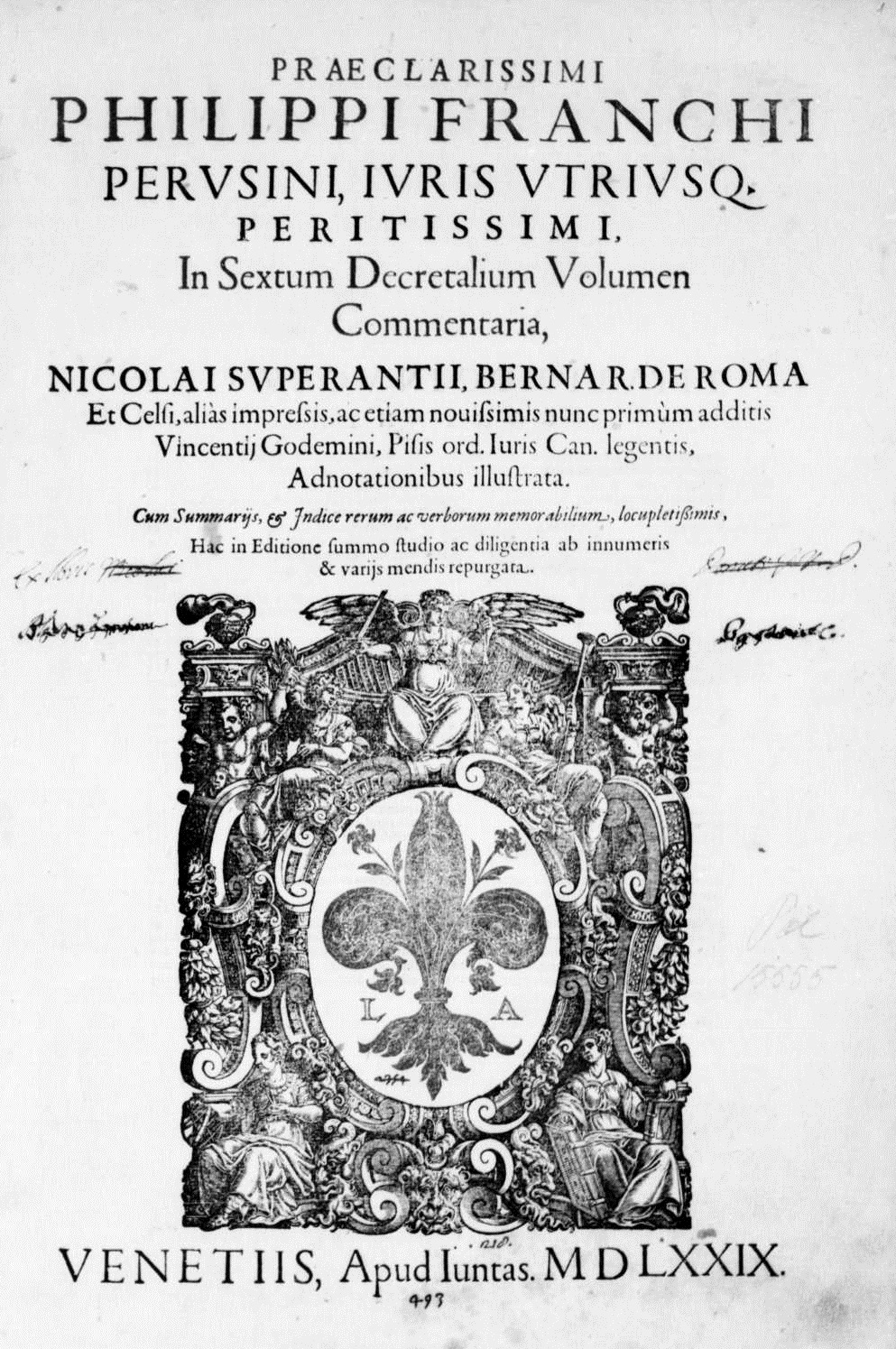 Frontespizio